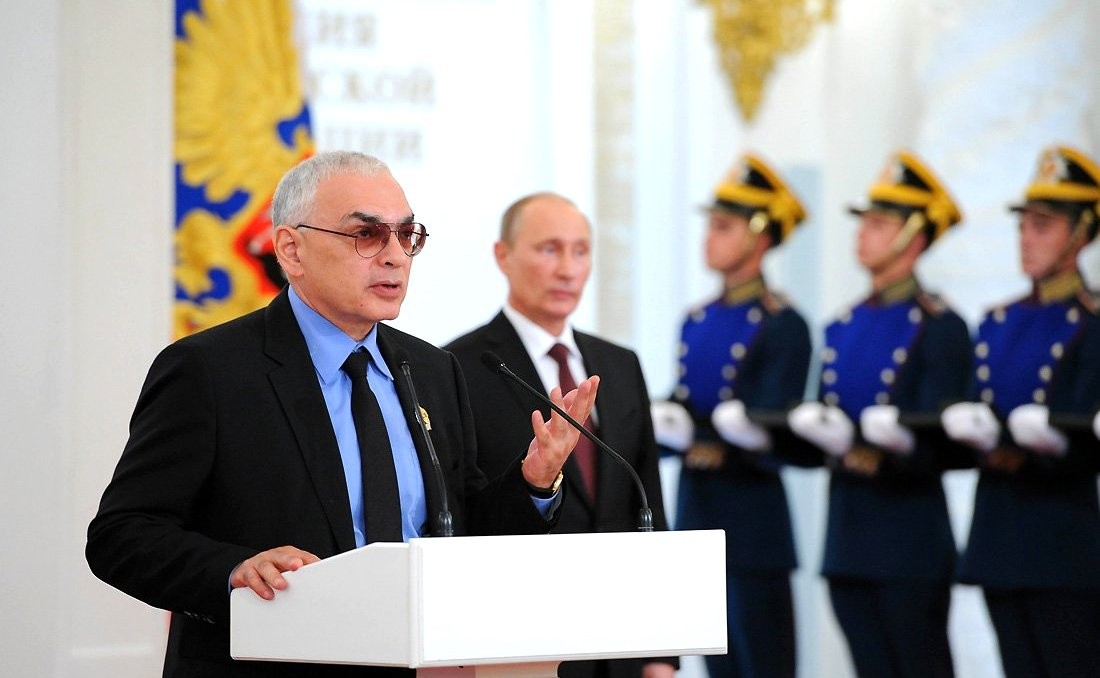 Государственная премия Российской Федерации в области литературы и искусства присуждена Карену Шахназарову